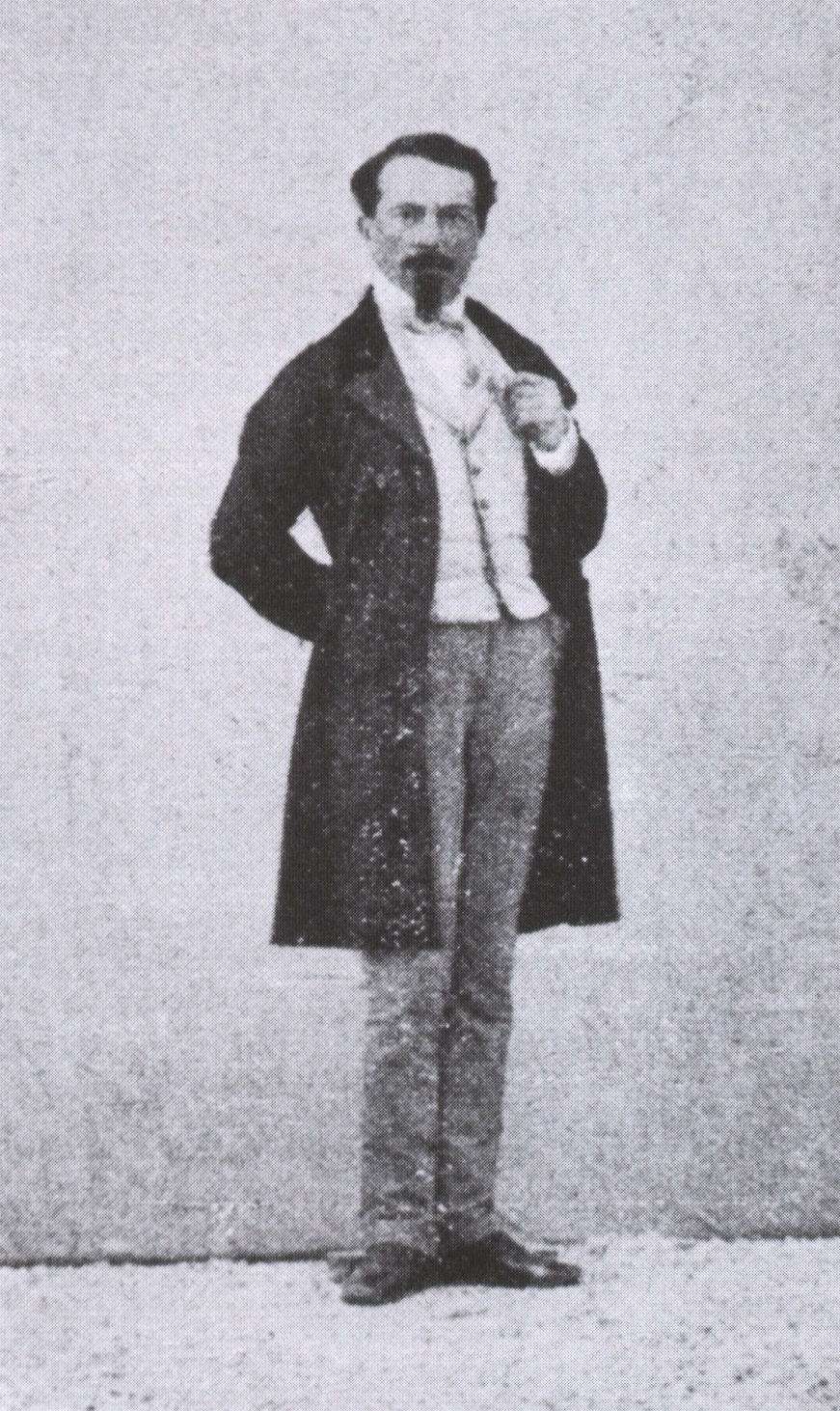 Ritratto di Antonio Fontanesi (1861-1863) eseguito da Alfredo D'Andrade.